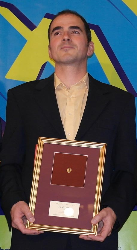 Vasvári Péter a 11. Aranyrajzszög Díj “A közelmúltban kifejtett magas szintű szakmai munkájáért díj”, Díjátadó Ünnepségén (2012)